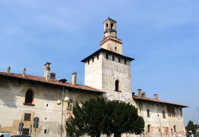 Castello a Cusago 09/2006